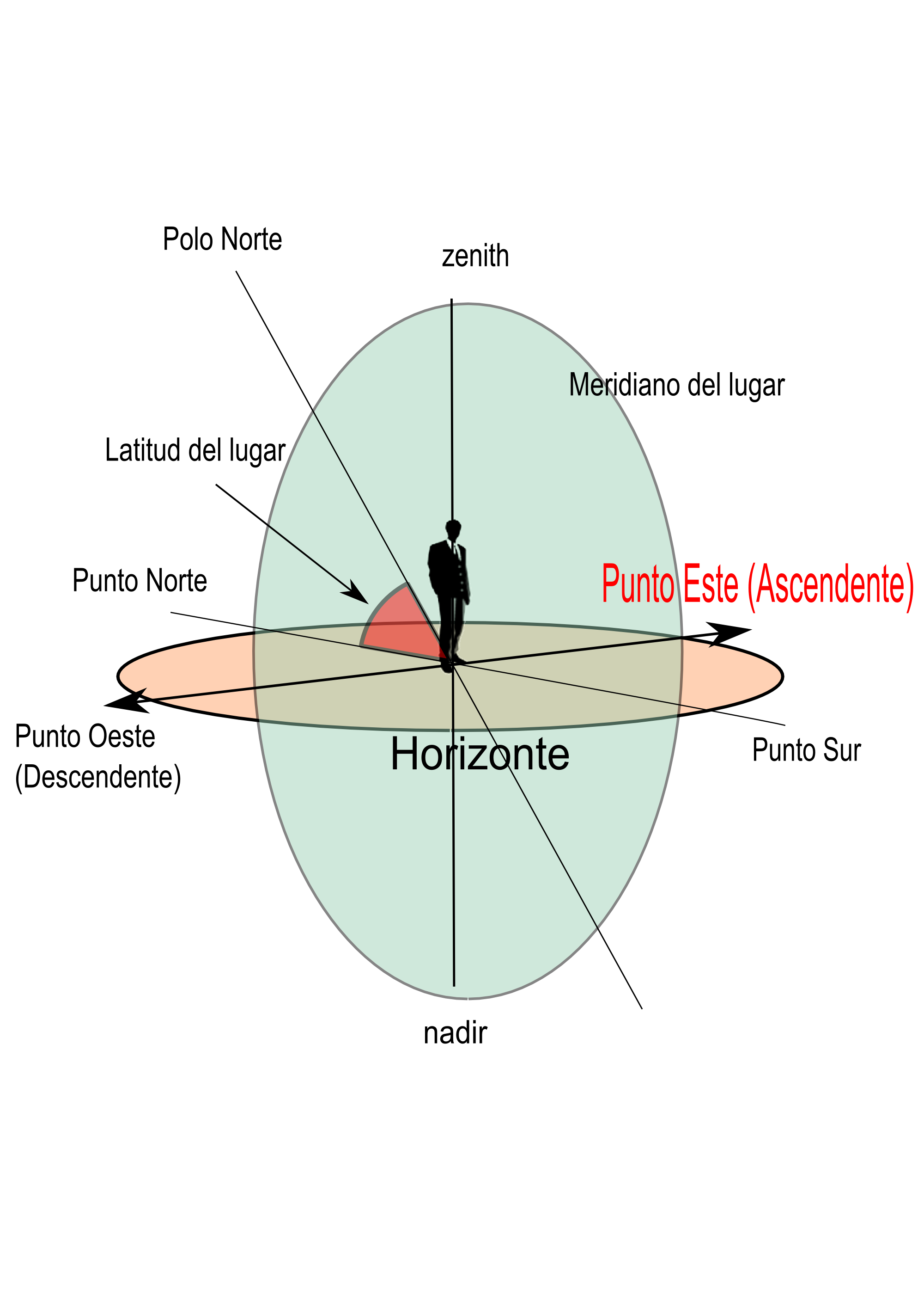 Descripción gráfica de la posición del Ascendente, imagen del horizonte con los puntos cardinales y el Meridiano local. Graphic description of the position of the Ascendant, image of the horizon with the cardinal points and the local meridian.